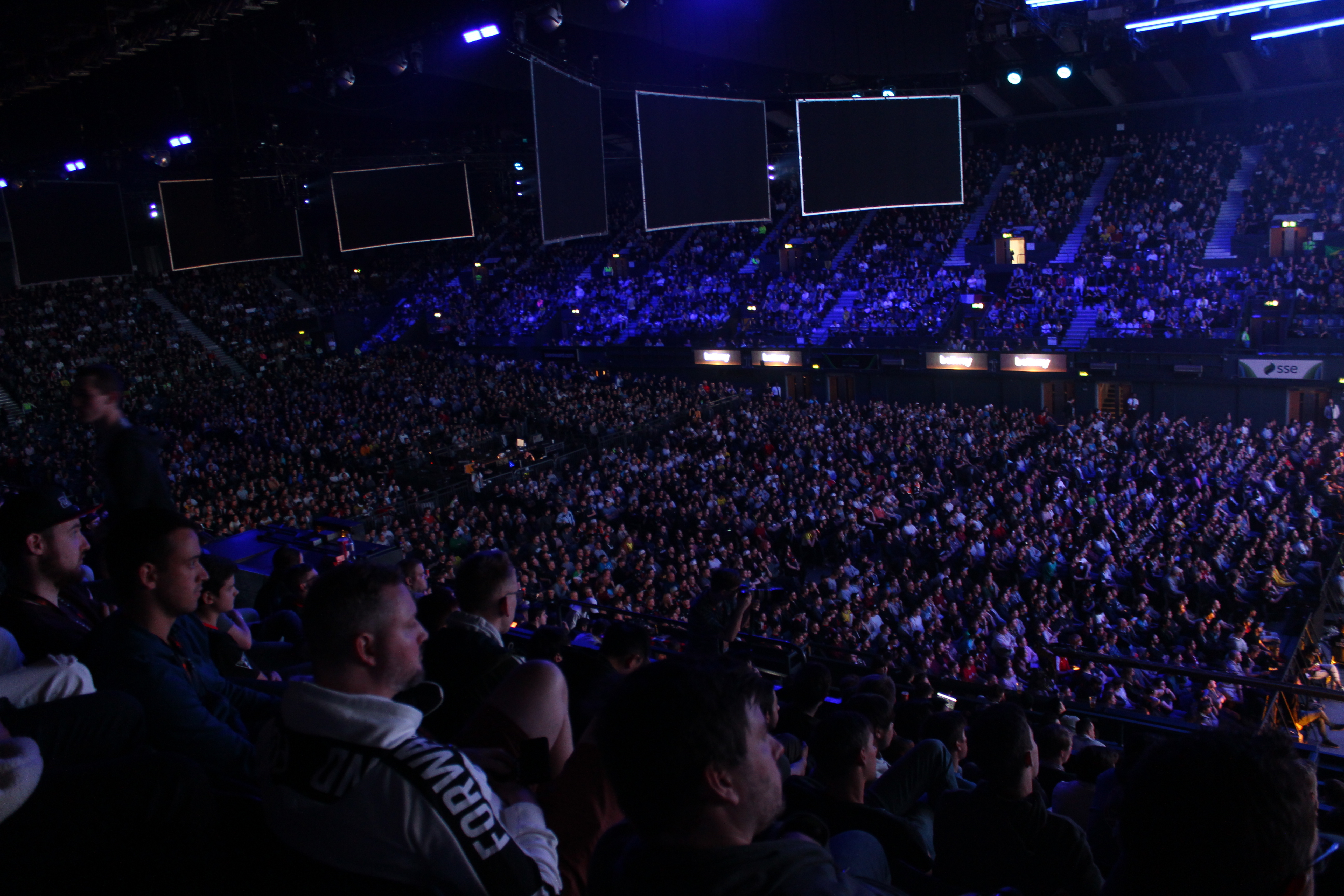 Зал зрителей FACEIT Major London 2018